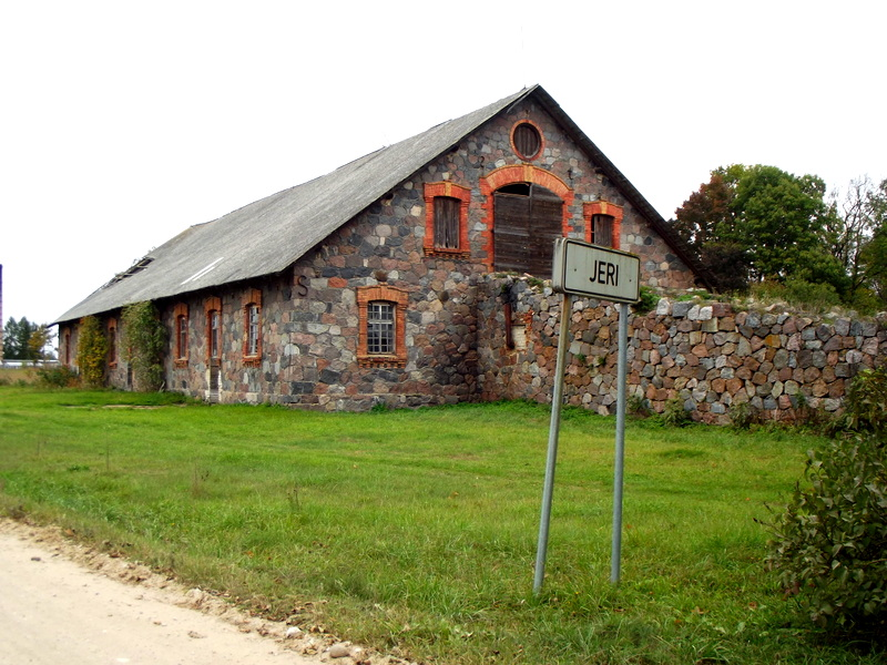 Jeru muiža